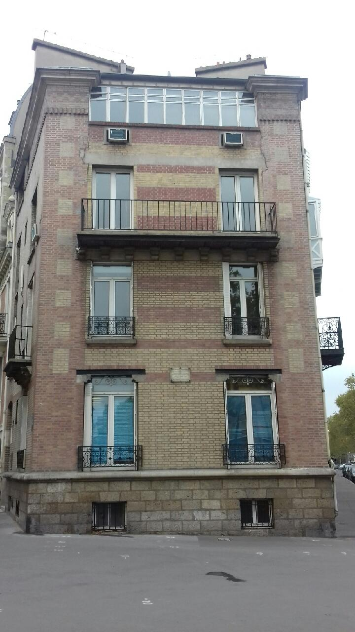 Demeure de l'illustrateur Maurice Leloir (1853-1940).